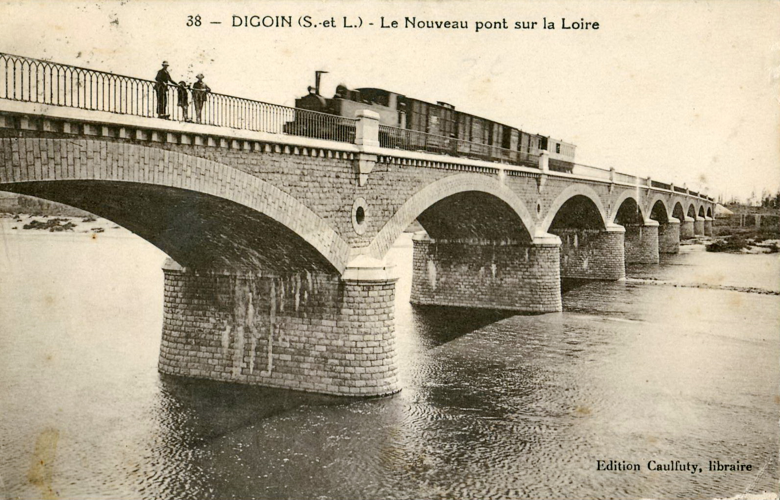 Carte postale ancienne éditée par Caulfuty, n°38 : DIGOIN - Le Nouveau pont sur la Loire